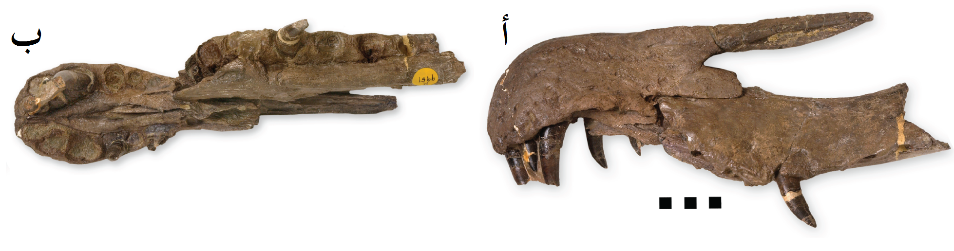 المنظر الداخلي والخارجي لِجُمجُمة الباريونيكس الووكري (Baryonyx walkeri). العينة ذات الرقم التسلسُلي (NHMUK VP R9951). شريط القياس: 5 سنتيمترات.